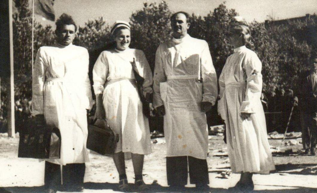 Szczecin, lata 50-60. Personel 109 Szpitala Wojskowego